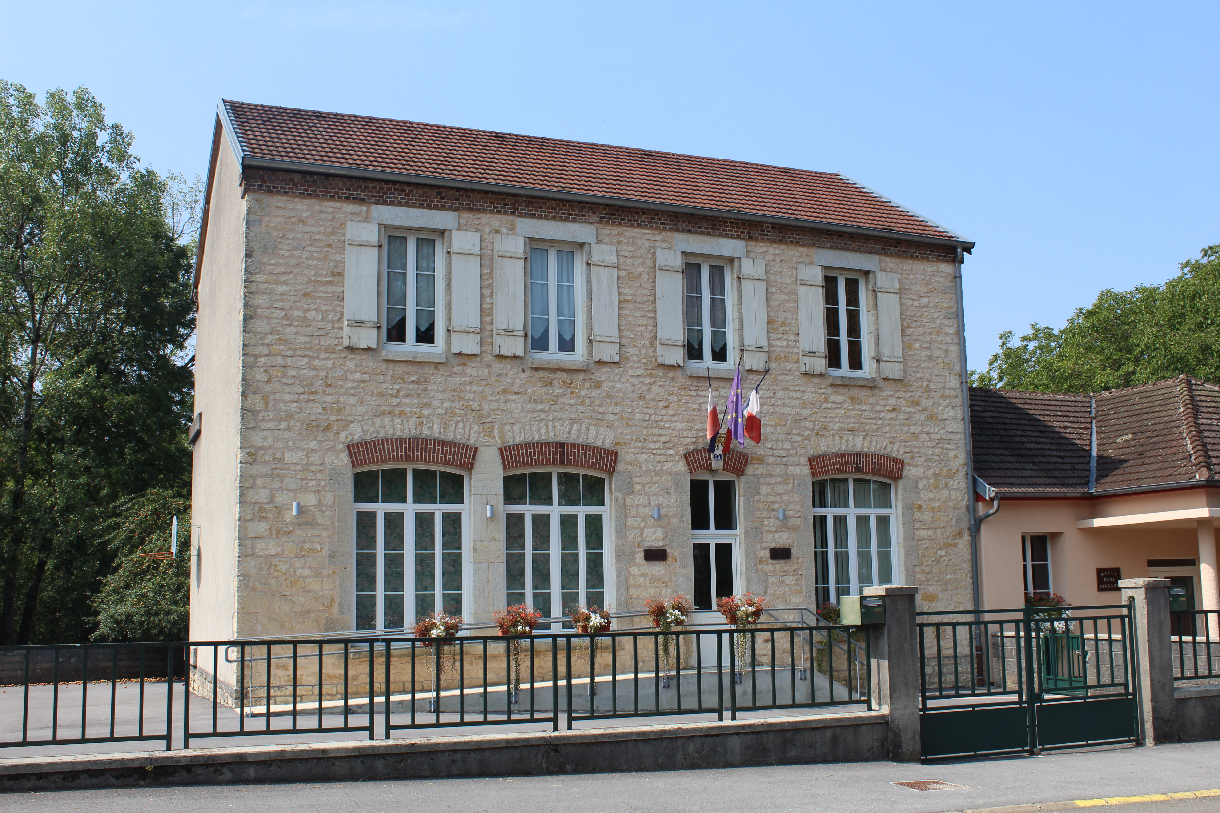 Mairie de Pagnoz.